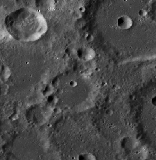 Cráter Celsius (LROC WAC-Lola)